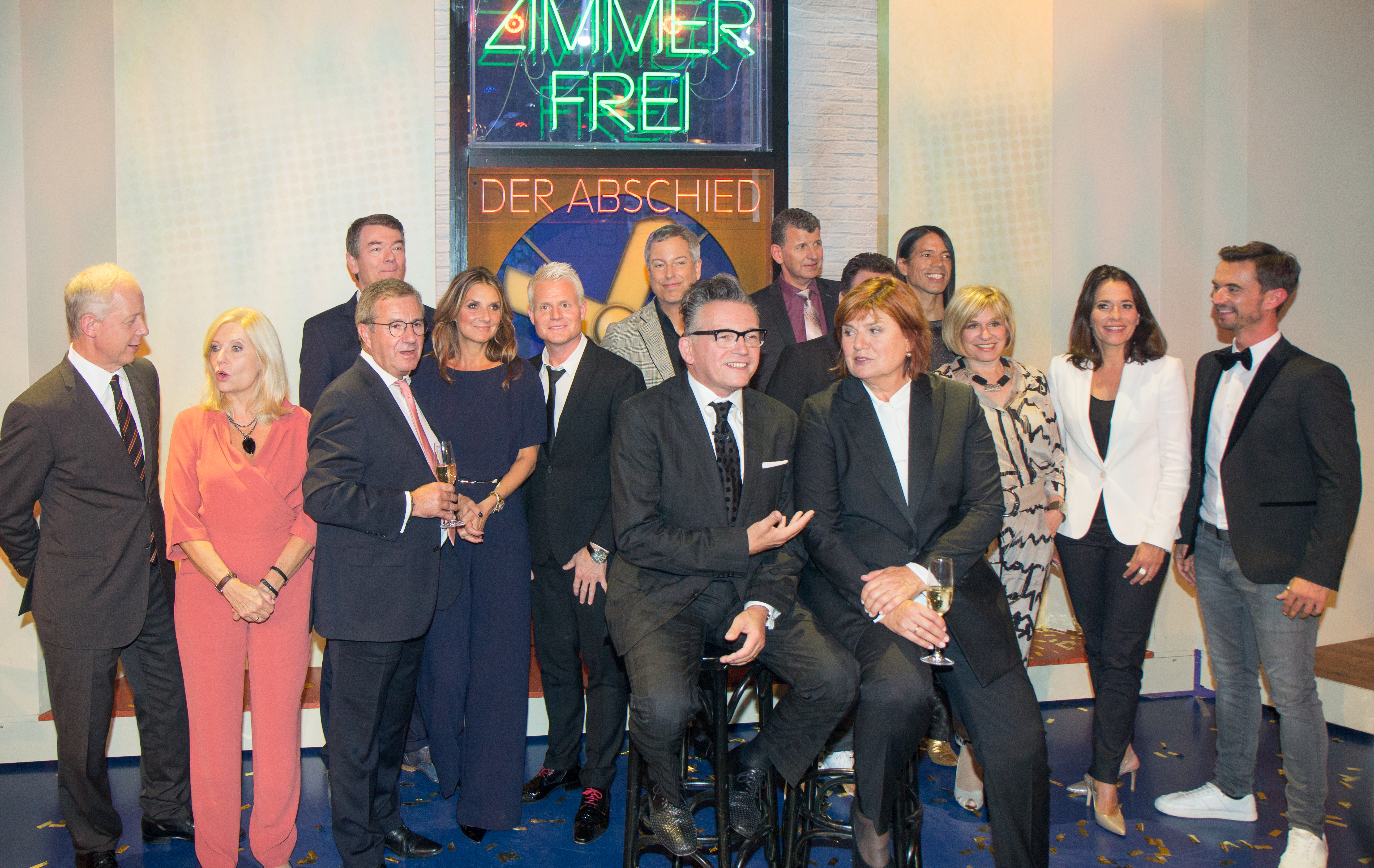 Zimmer frei - der Abschied Foto: Gruppenbild mit allen Gästen nach Abschluss der Aufzeichnung.